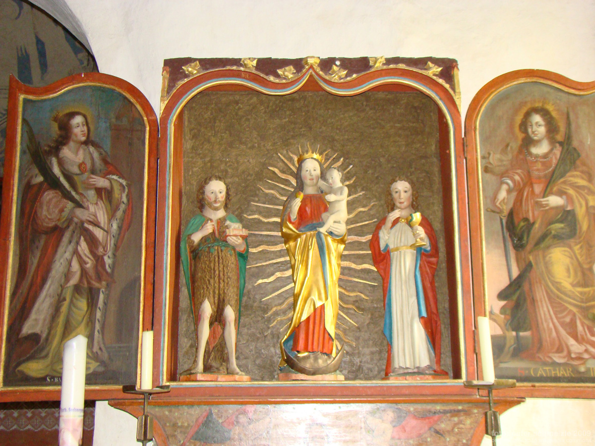 Liebfrauenaltar in der Gangolfskapelle in Neudenau